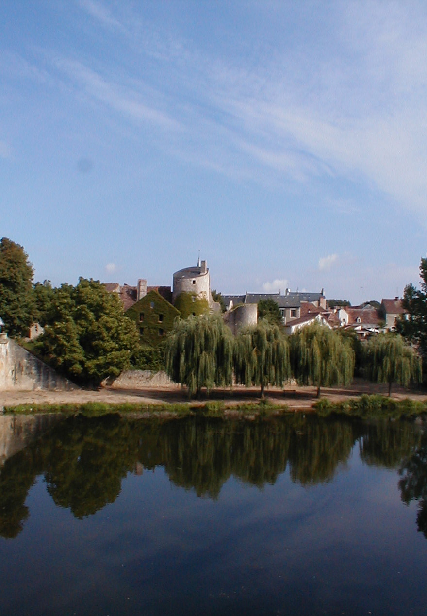 vue sur le château depuis l'autre côté de l'Anglin